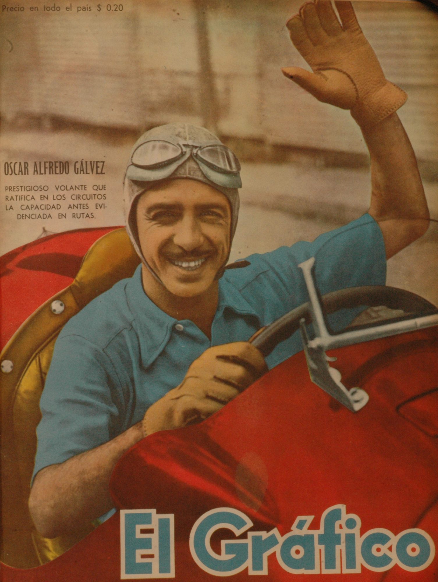 El Grafico del 18 de Abril de 1947. Edicion 1449